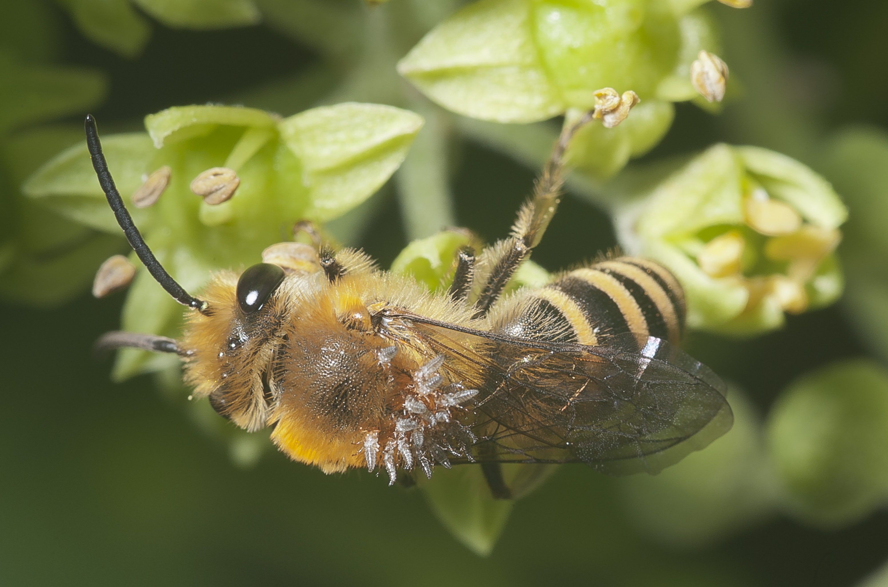 Efeu-Seidenbiene (Colletes hederae), parasitiert durch Triungulinen von Stenoria analis, aufgenommen in Stuttgart. Dank an die Mitglieder von Entomologie.de für die Bestimmung. Ido: Ivy bee (Colletes hederae), parasitized by Stenoria analis, image taken in Stuttgart, Germany. Thanks to the members of Entomologie.de for the identification.